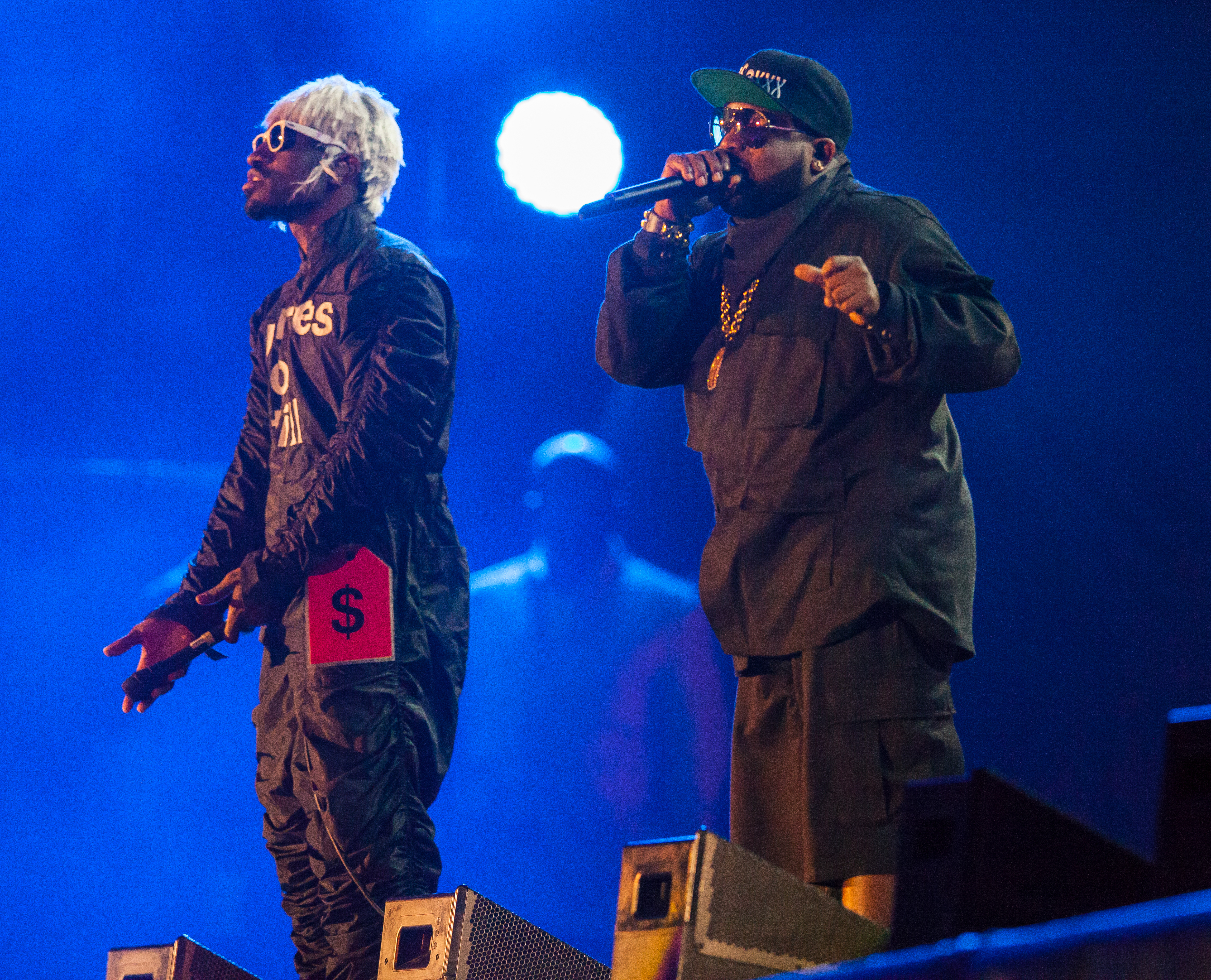 Rock'n'Heim Rock Festival Hockenheim August 2014